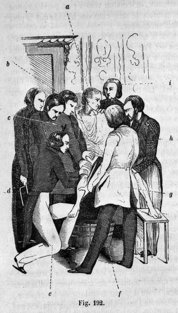 Réf. image : 06546 Mots-clés : Chirurgie. Médecins et malades. Amputations. Jambes . 19e siècle Auteur de l'ouvrage : SEDILLOT, Charles Emmanuel Ouvrage : Traité de médecine opératoire bandages et appareils Edition : Paris : Baillière, J. B., 1865 Cote : 030570 Empl. de l'image : Fig. 192 Adresse permanente de cette image